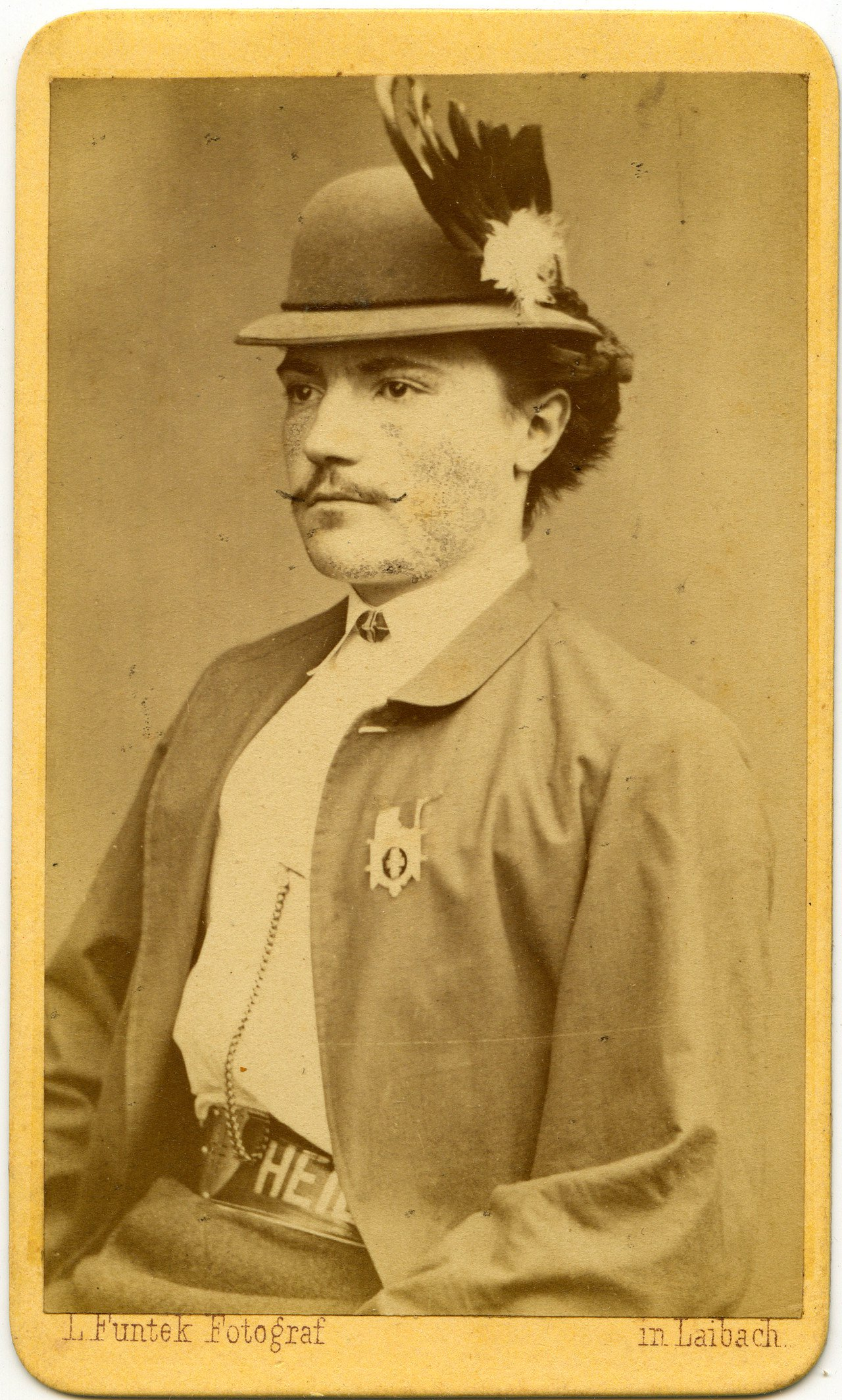 Portret v lovski opravi.